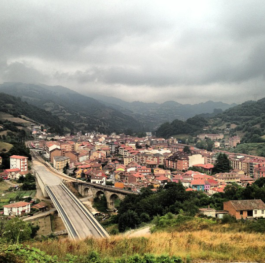 Vista de La Pola Ḷḷena desde uno de los montes que la rodean, se puede apreciar el puente de la futura Variante de Pajares en primer plano.